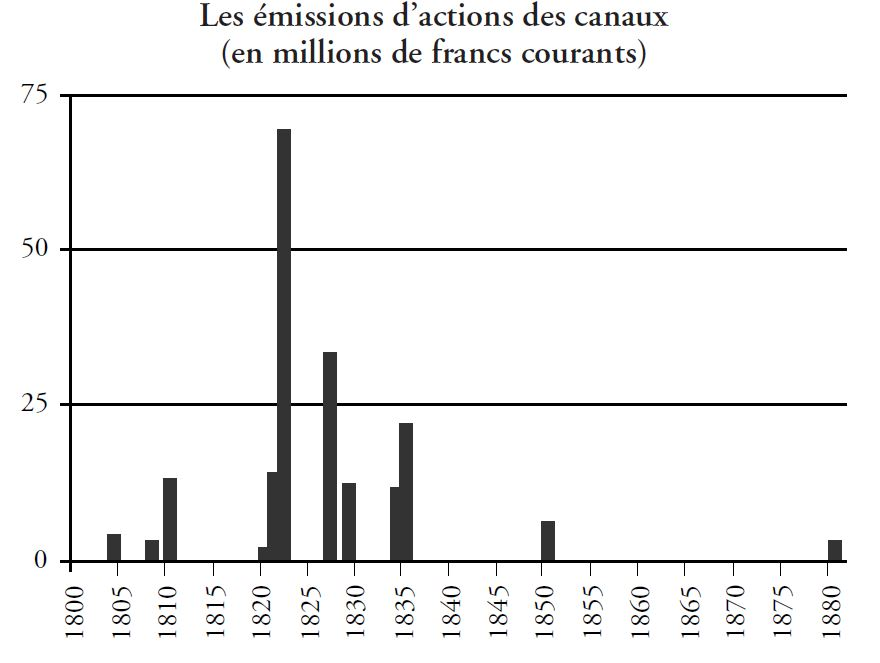 Sociétés de canaux (1800-1850) - émissions actions (en milions de francs courants)